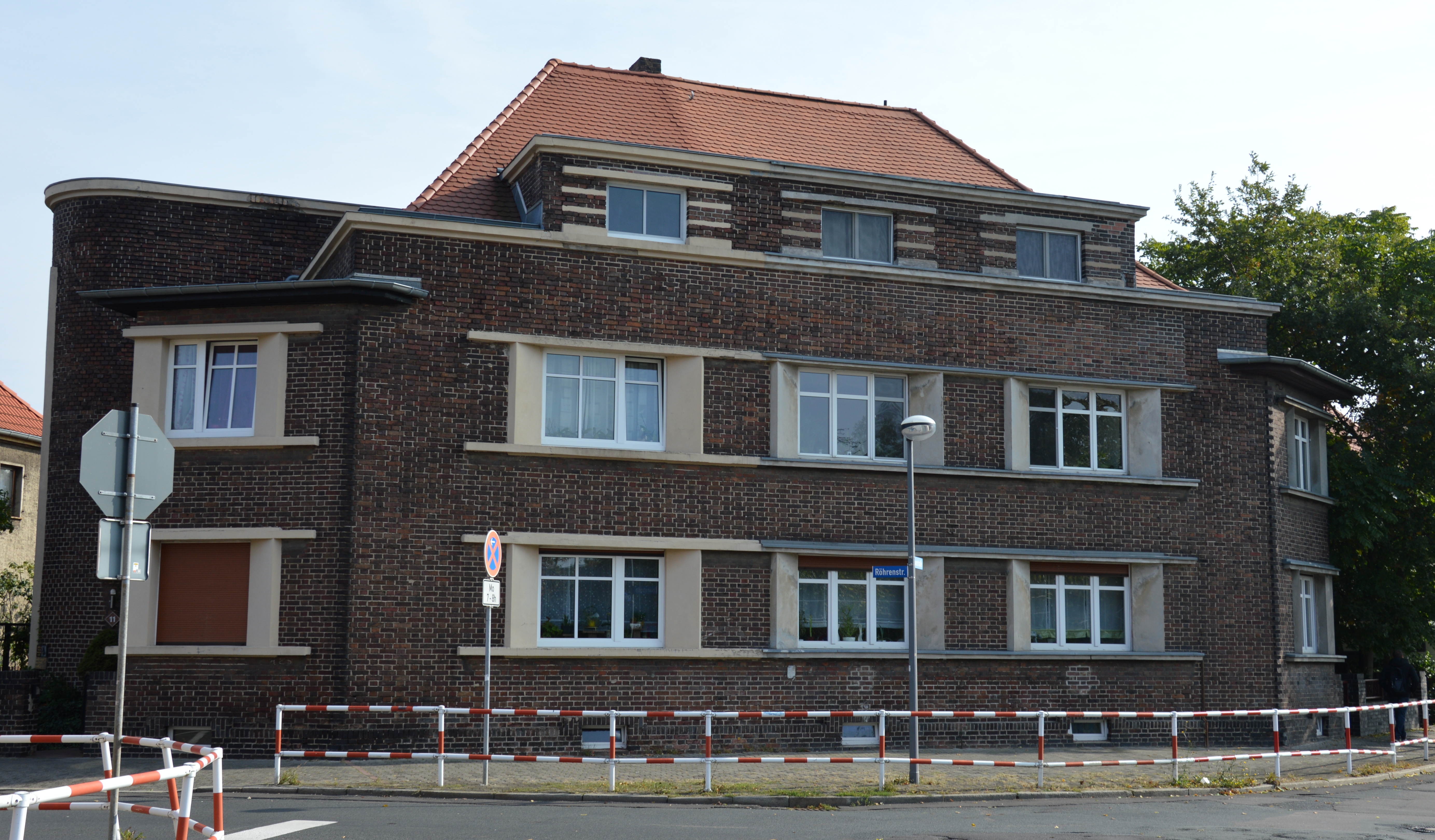 Haus Röhrenstraße 11 in Bitterfeld